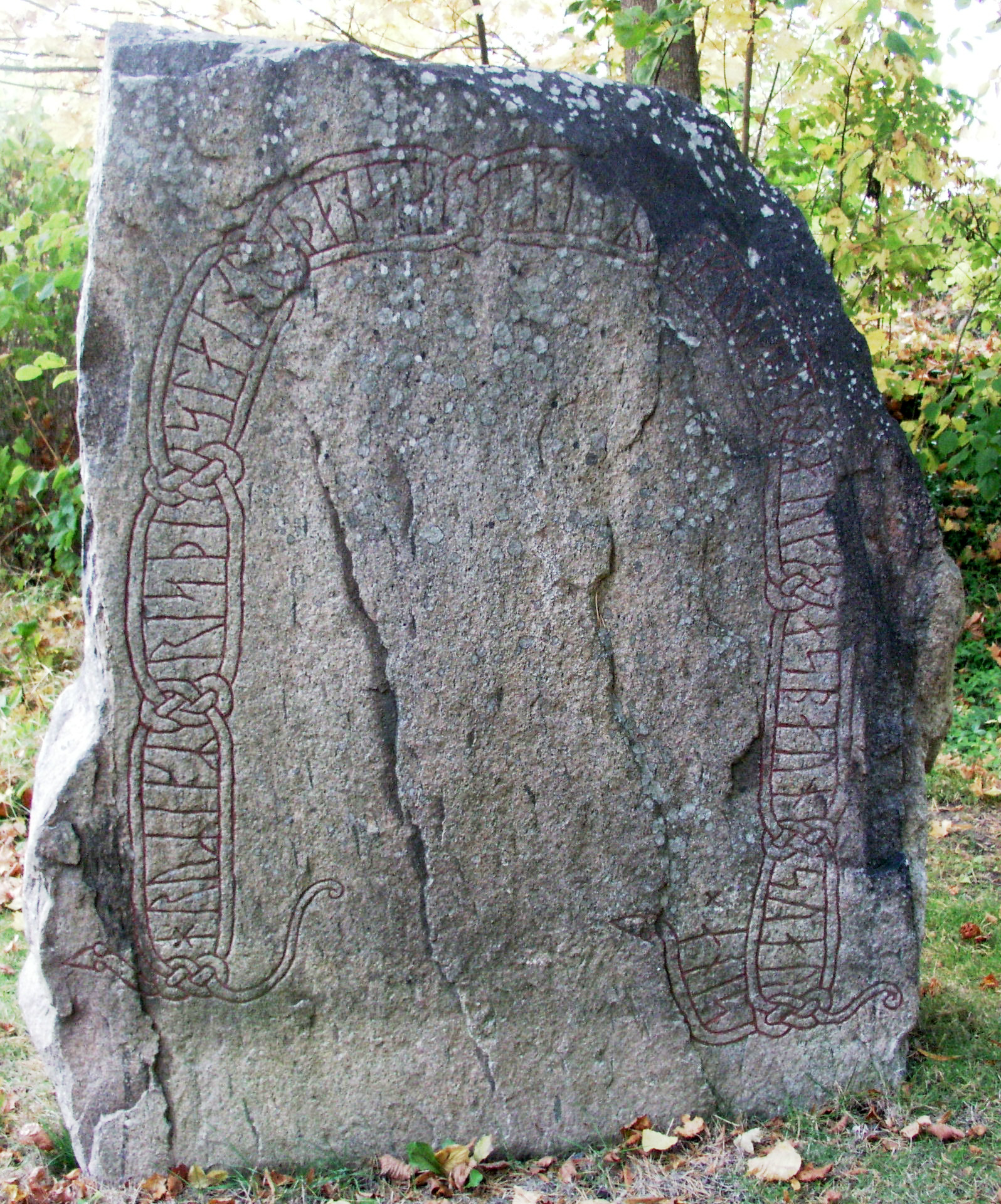 Styrstads kyrka /Styrstad church. Runestone Ög 153. Sweden.